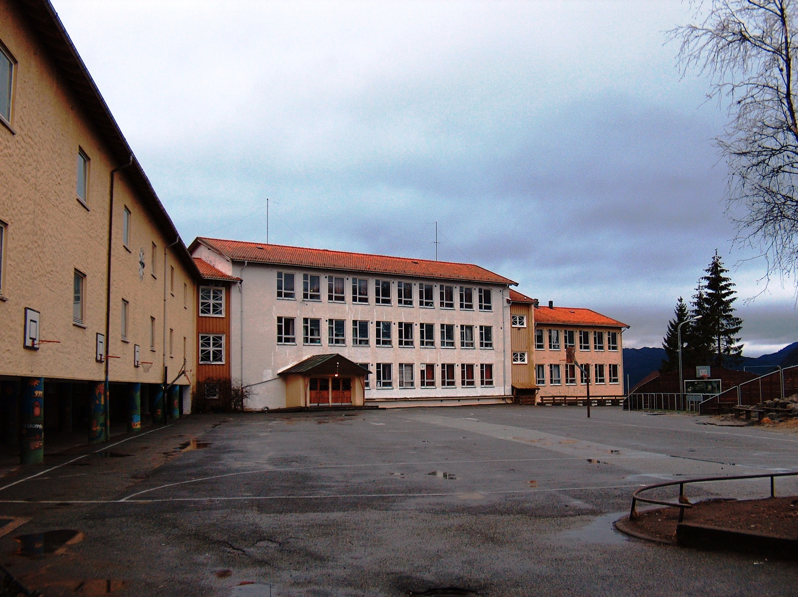 Ytre Arna barne- og ungdomsskule